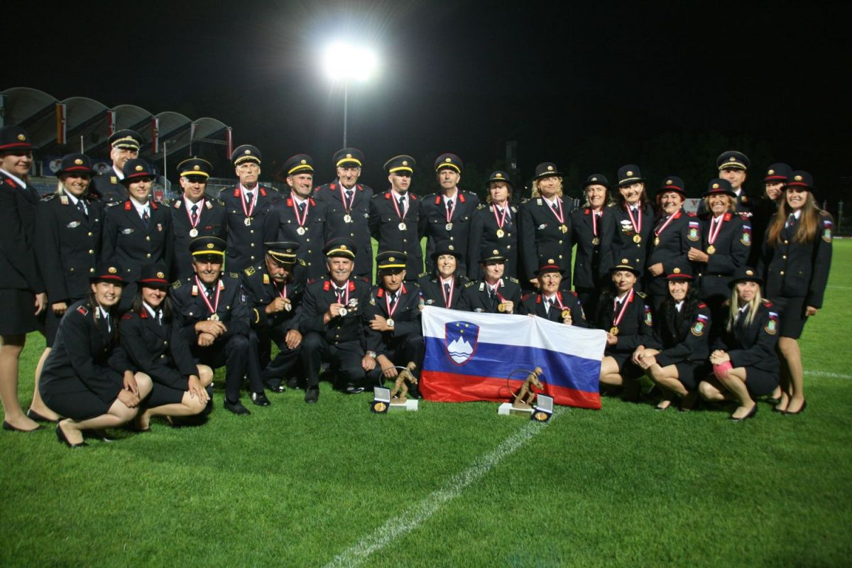 PGD Hajdoše, Villach, 2017